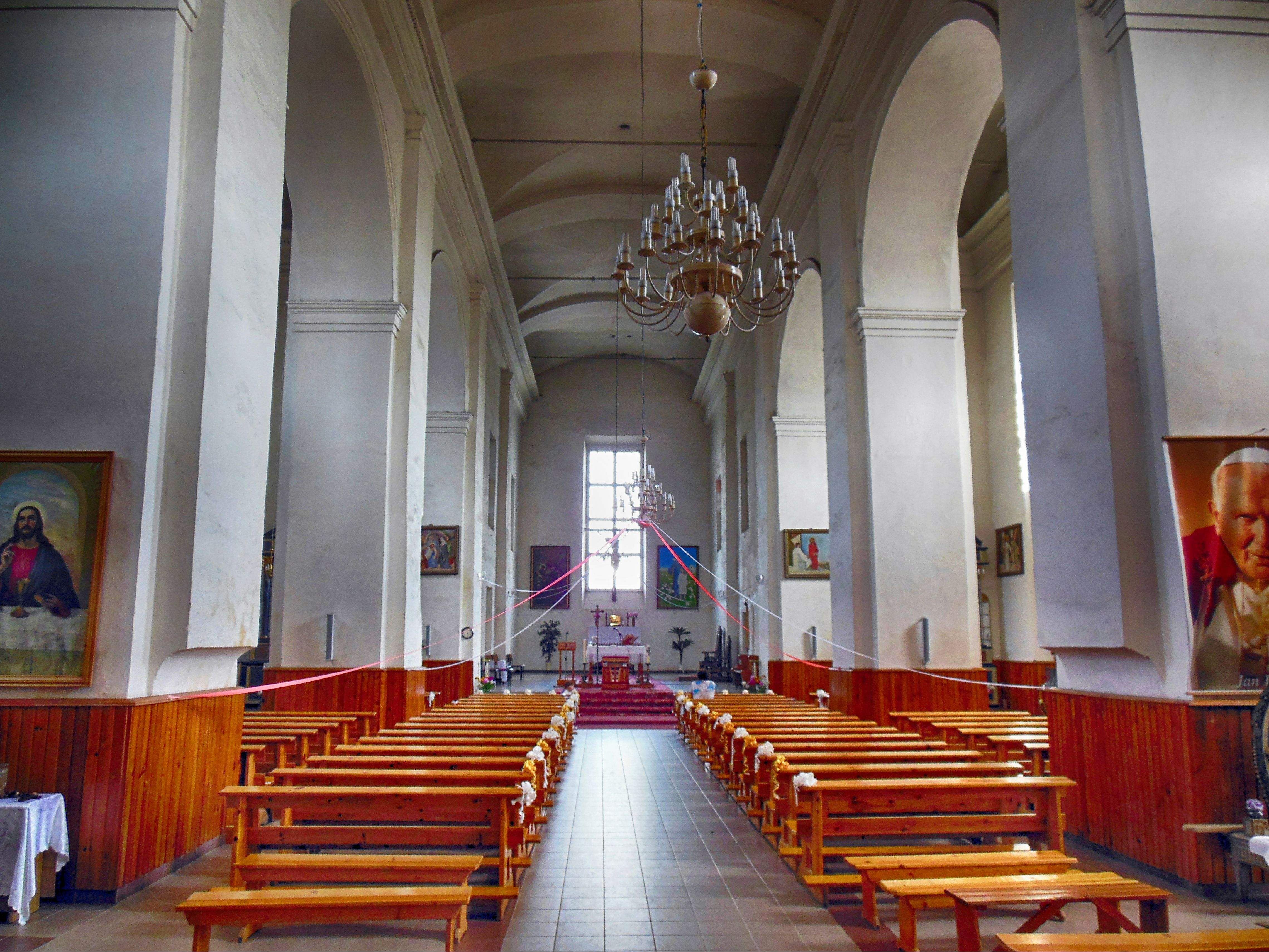 Беларуская (тарашкевіца): Касьцёл Сьв. Юзафа з брамай-званіцай. г. Валожын This is a photo of Belarusian heritage monument. Reference number: 612Г000073 ( WLM)